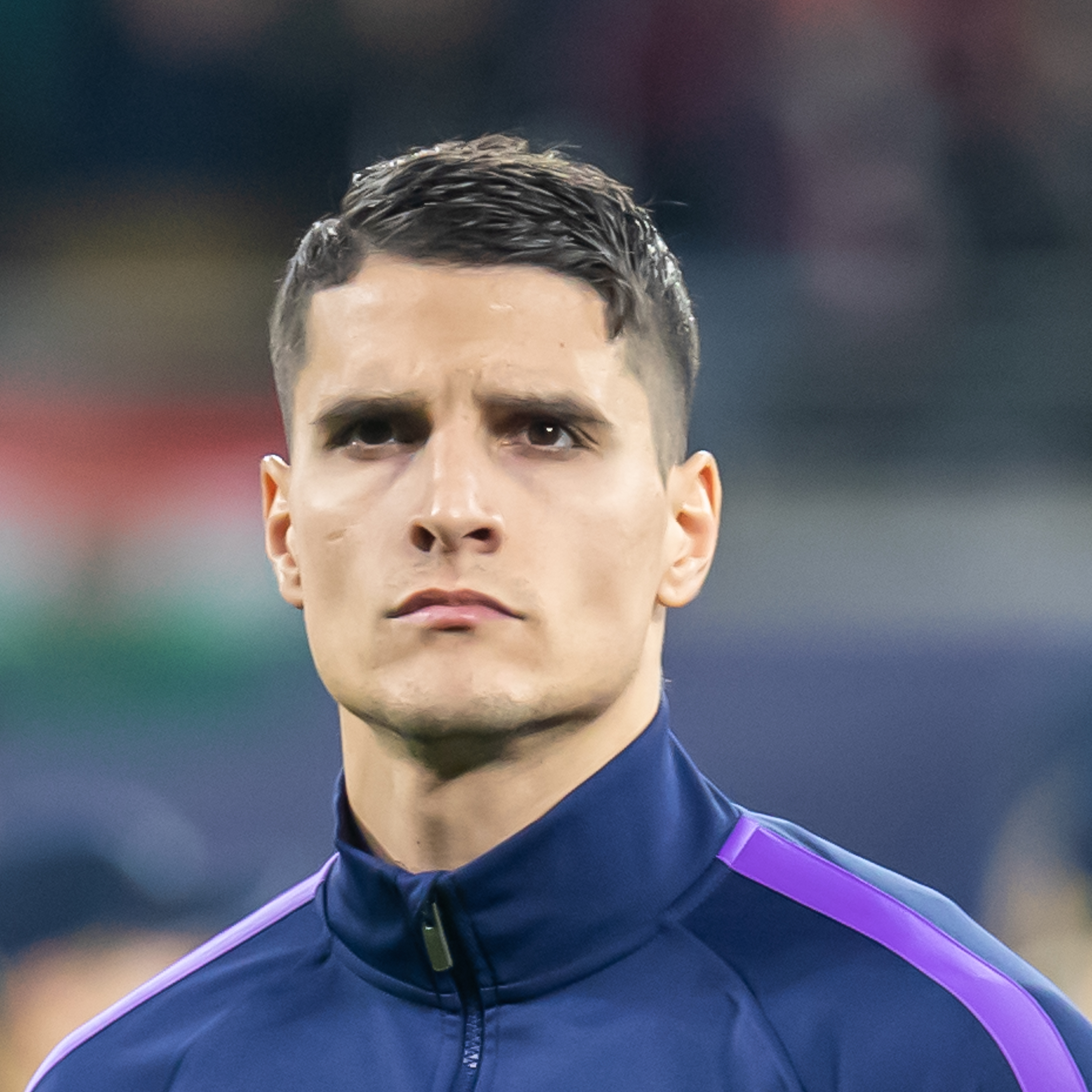 Fußball, Männer, UEFA Champions League Achtelfinale, RB Leipzig - Tottenham Hotspur; Erik Lamela (Tottenham Hotspur, 11)